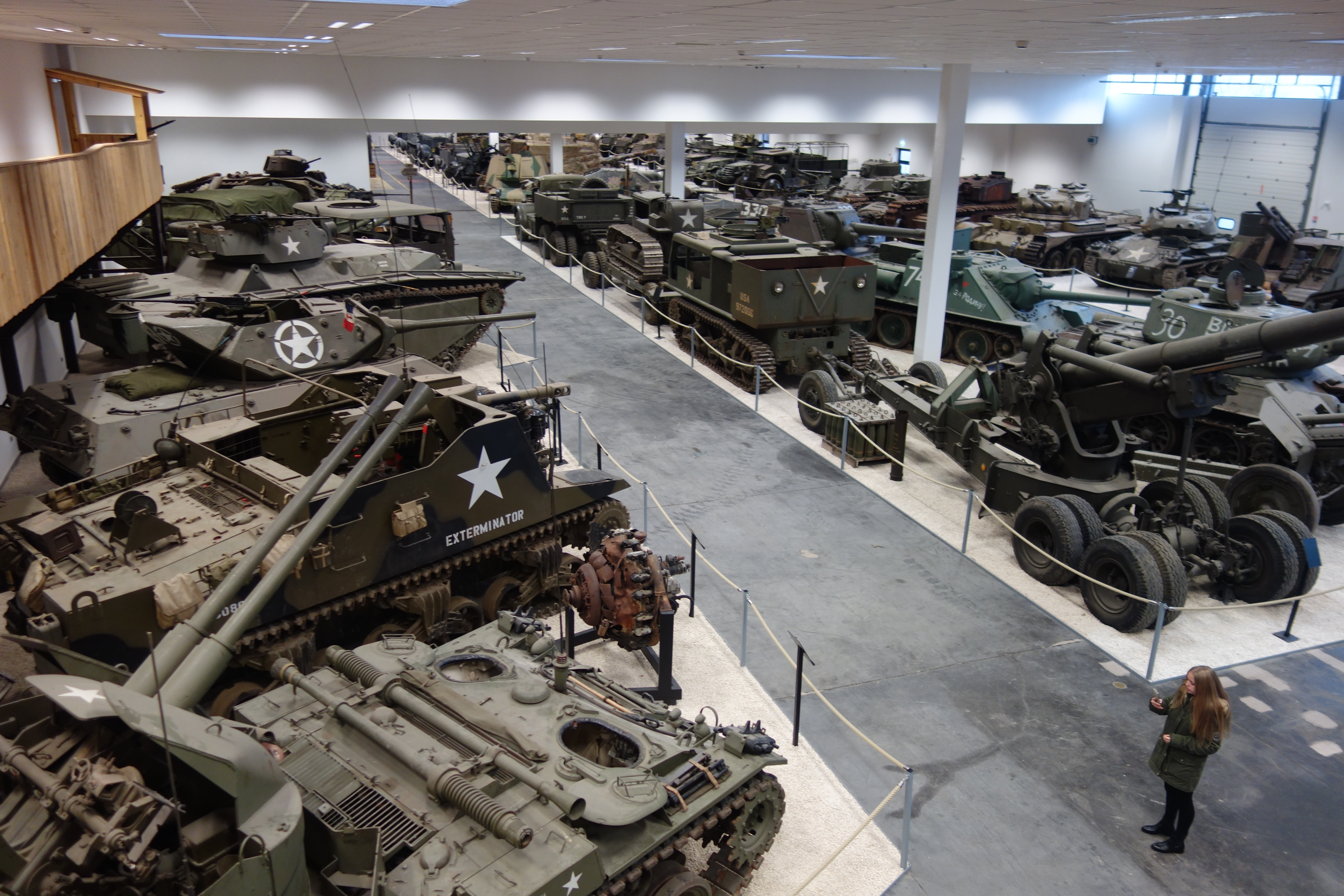 Salle principale